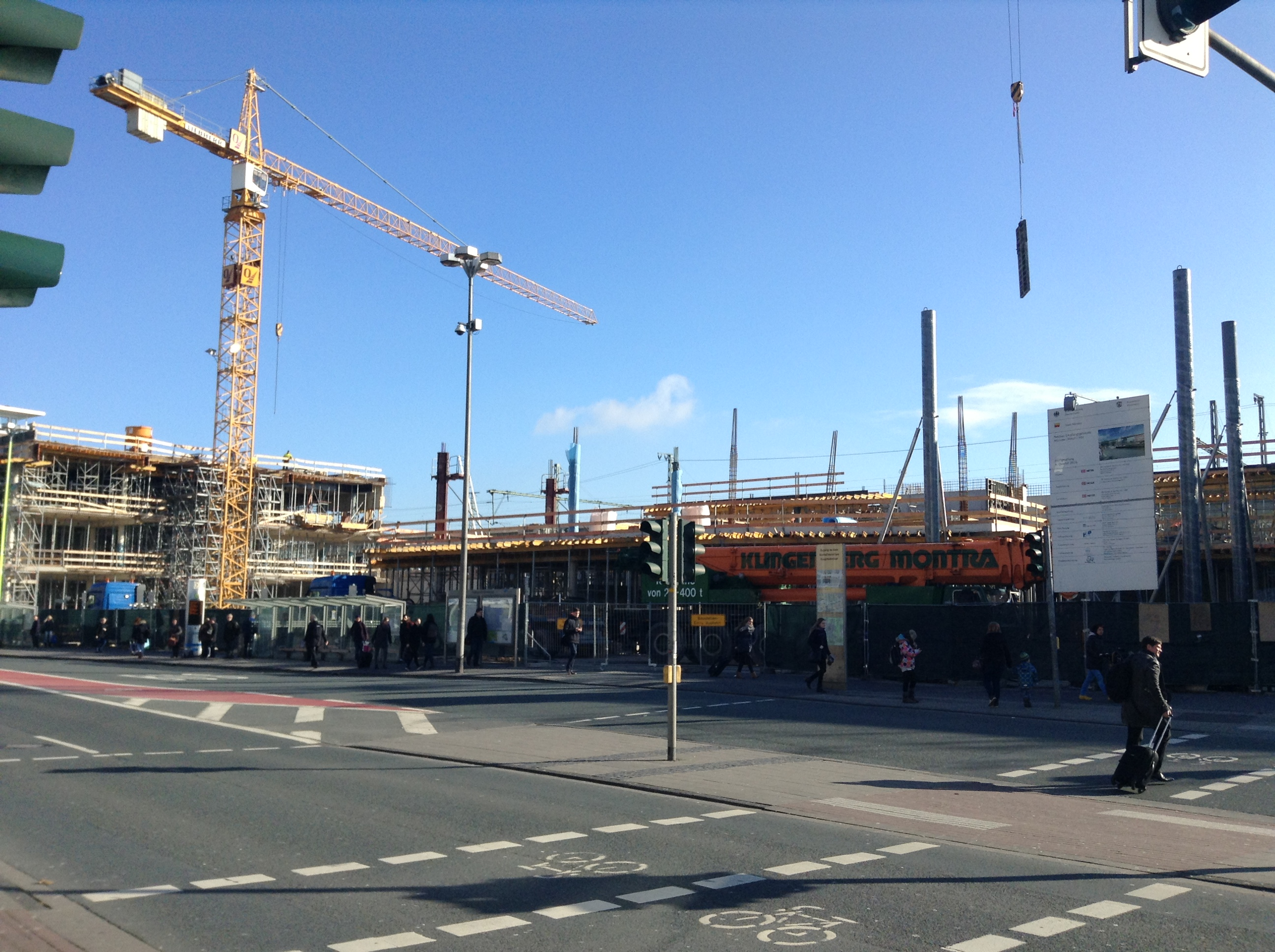 Münster (Westfalen) Hauptbahnhof, Blick auf die Baustelle, 25. Februar 2016